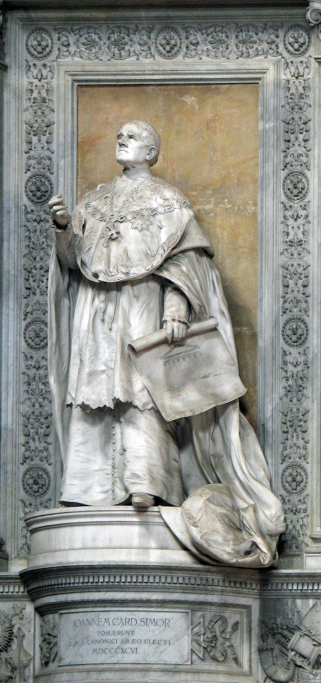 Kardinál Ján Simor